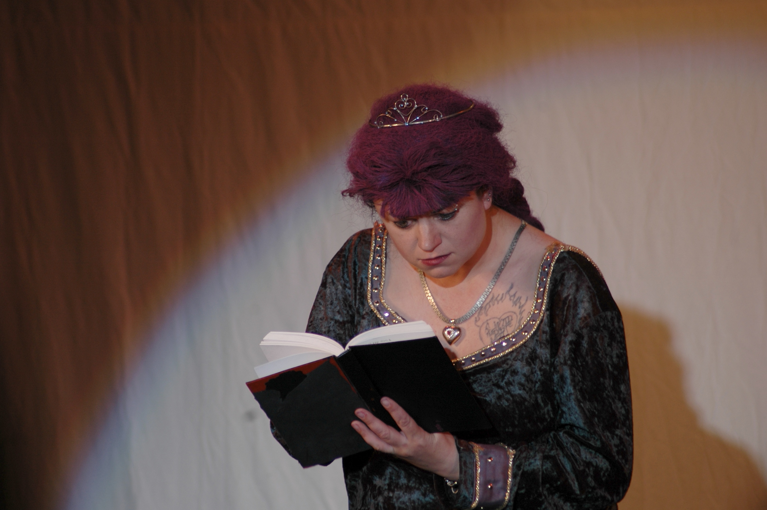 Fiona imitator. Balticon 2005, Baltimore.